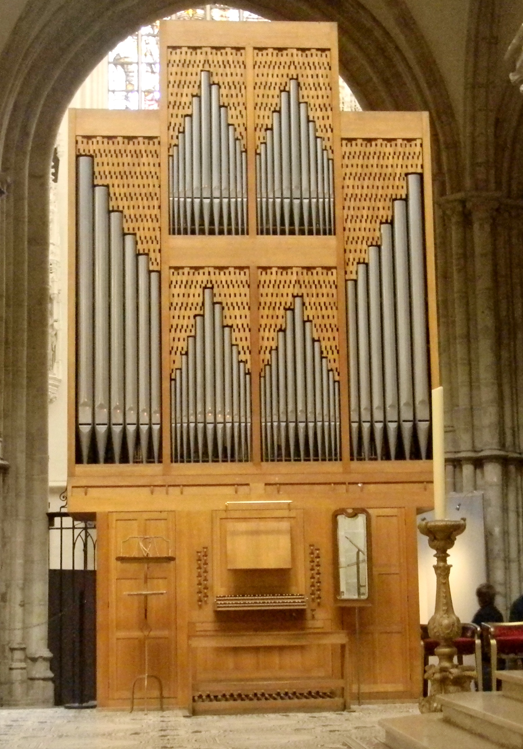 L'organo Collon della cattedrale di Bruxelles